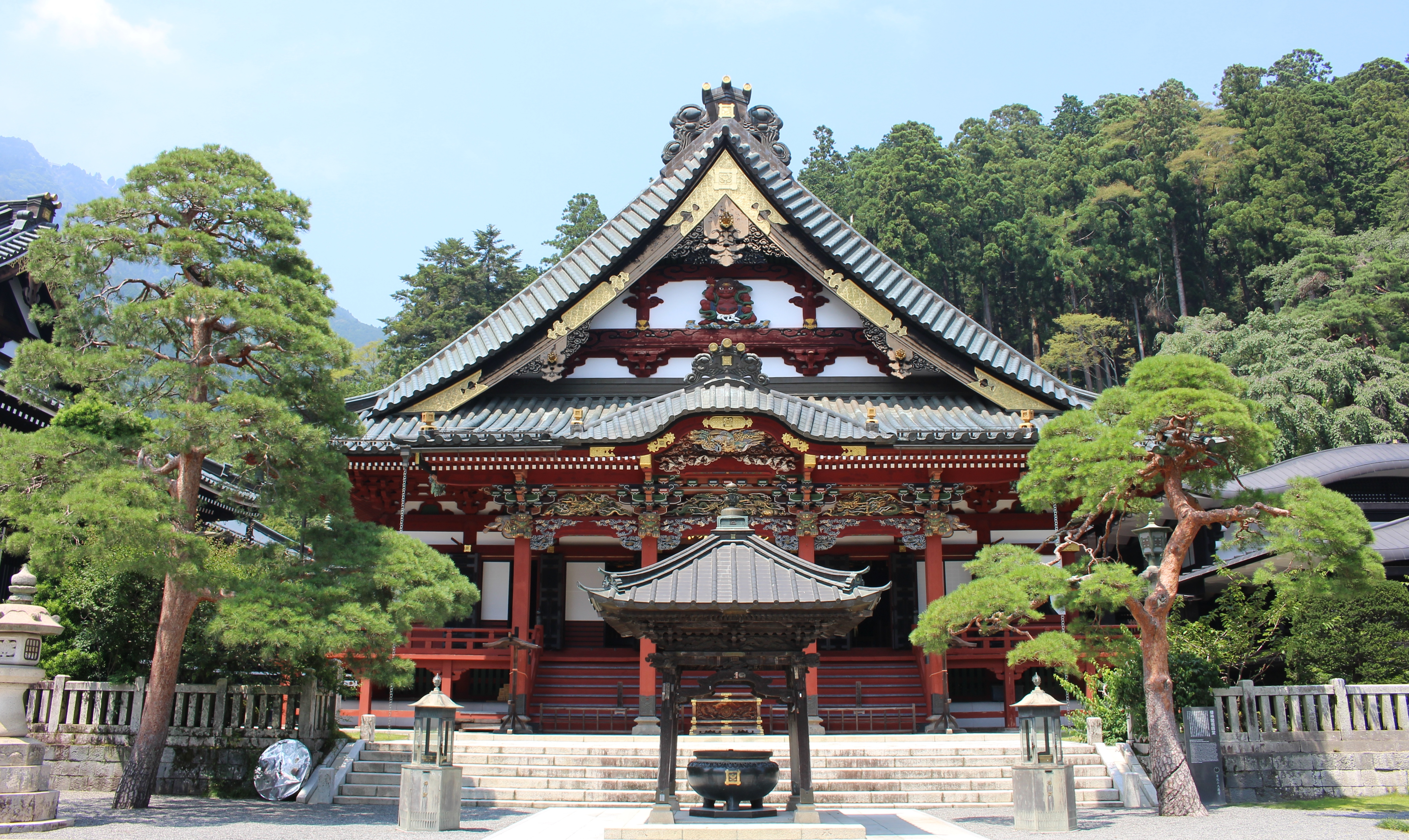 身延山久遠寺